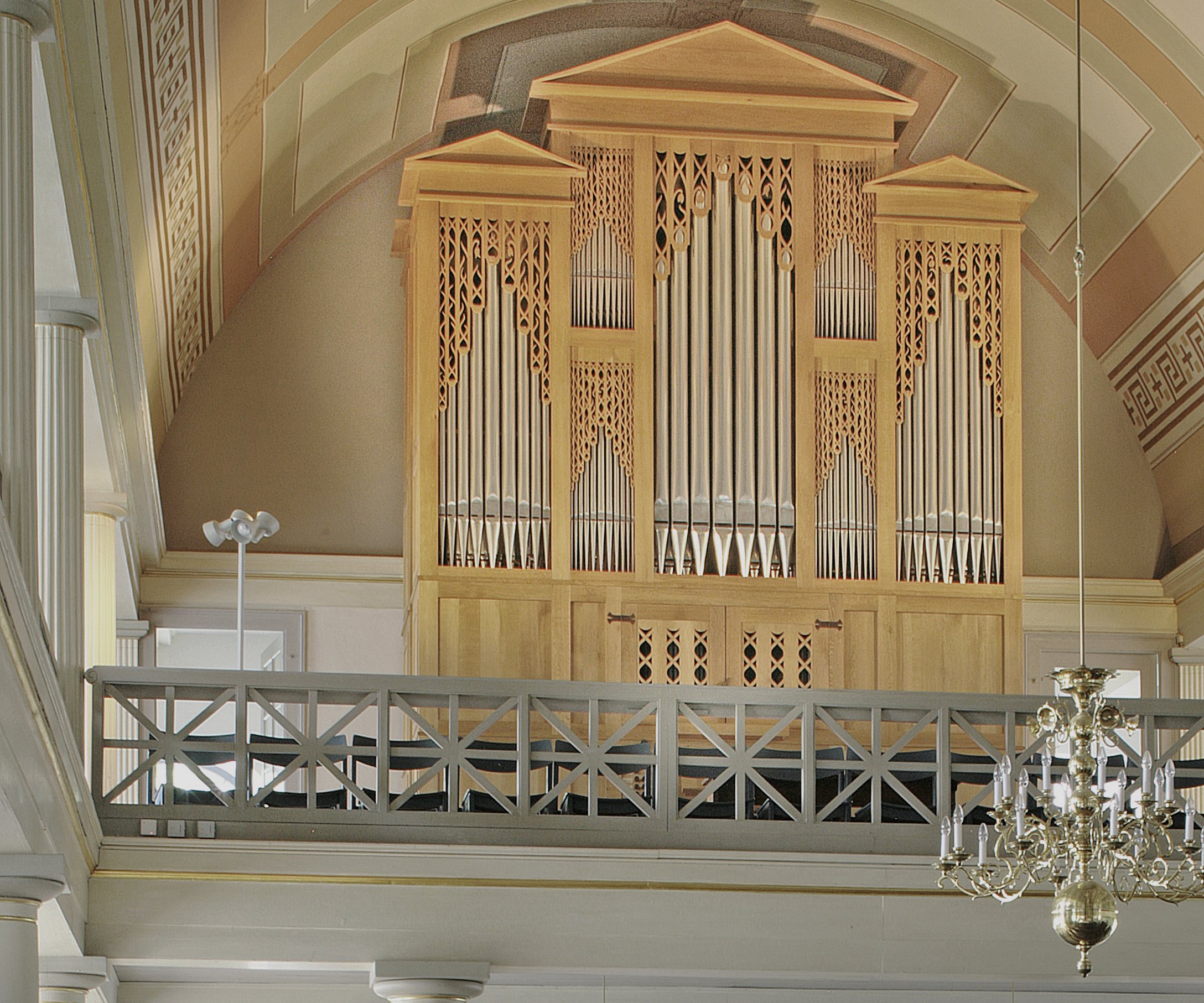 Orgel in St. Petri und Pauli Bad Münder, Landkreis Hameln-Pyrmont, Niedersachsen , Deutschland